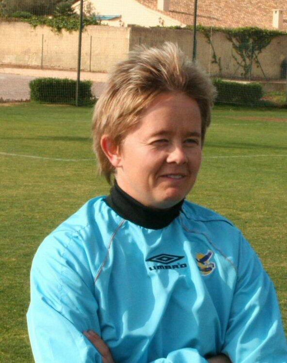 Fotballtreneren Gøril Kringen